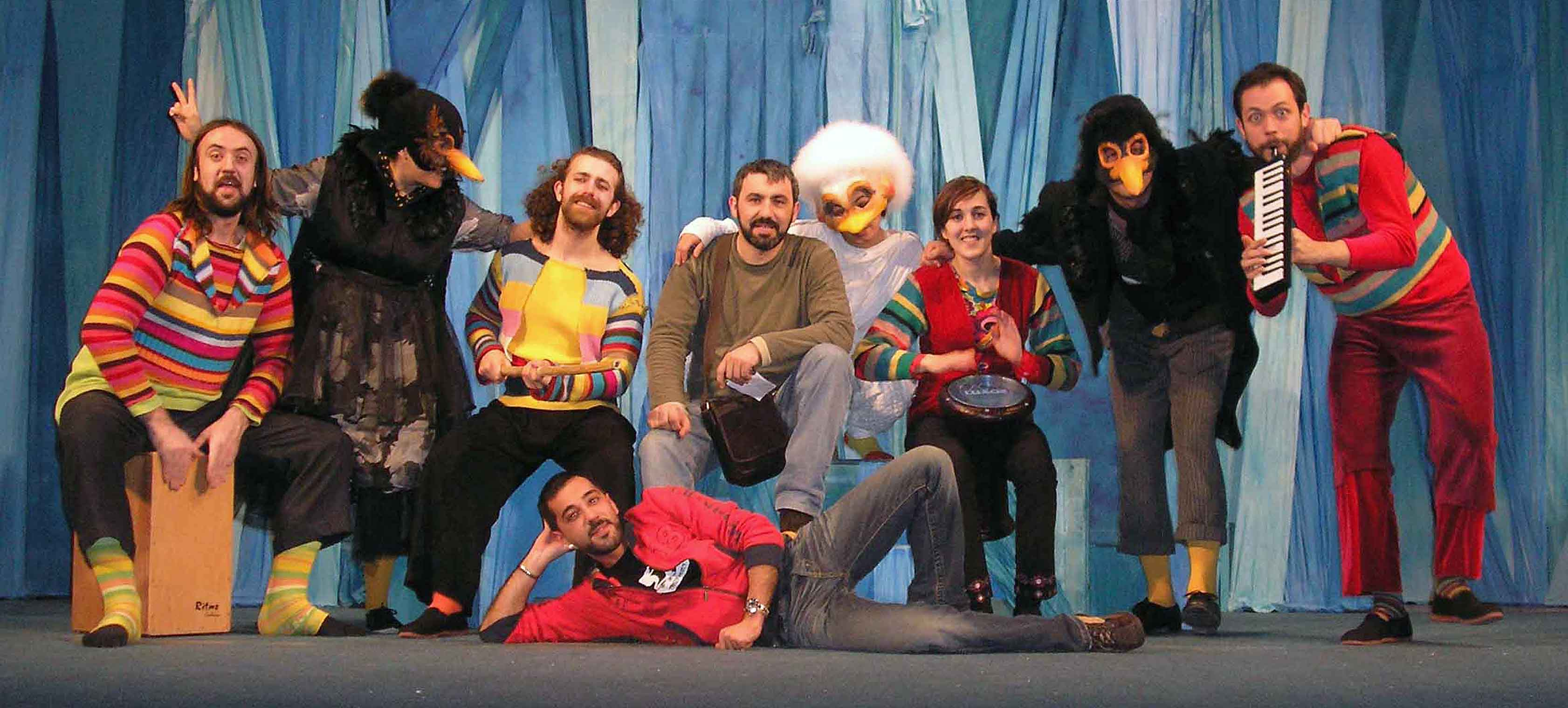 Representación da peza Merlo Branco